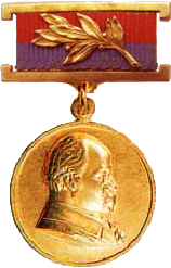 Почётный знак лауреата премии Украинской ССР имени Тараса Шевченка